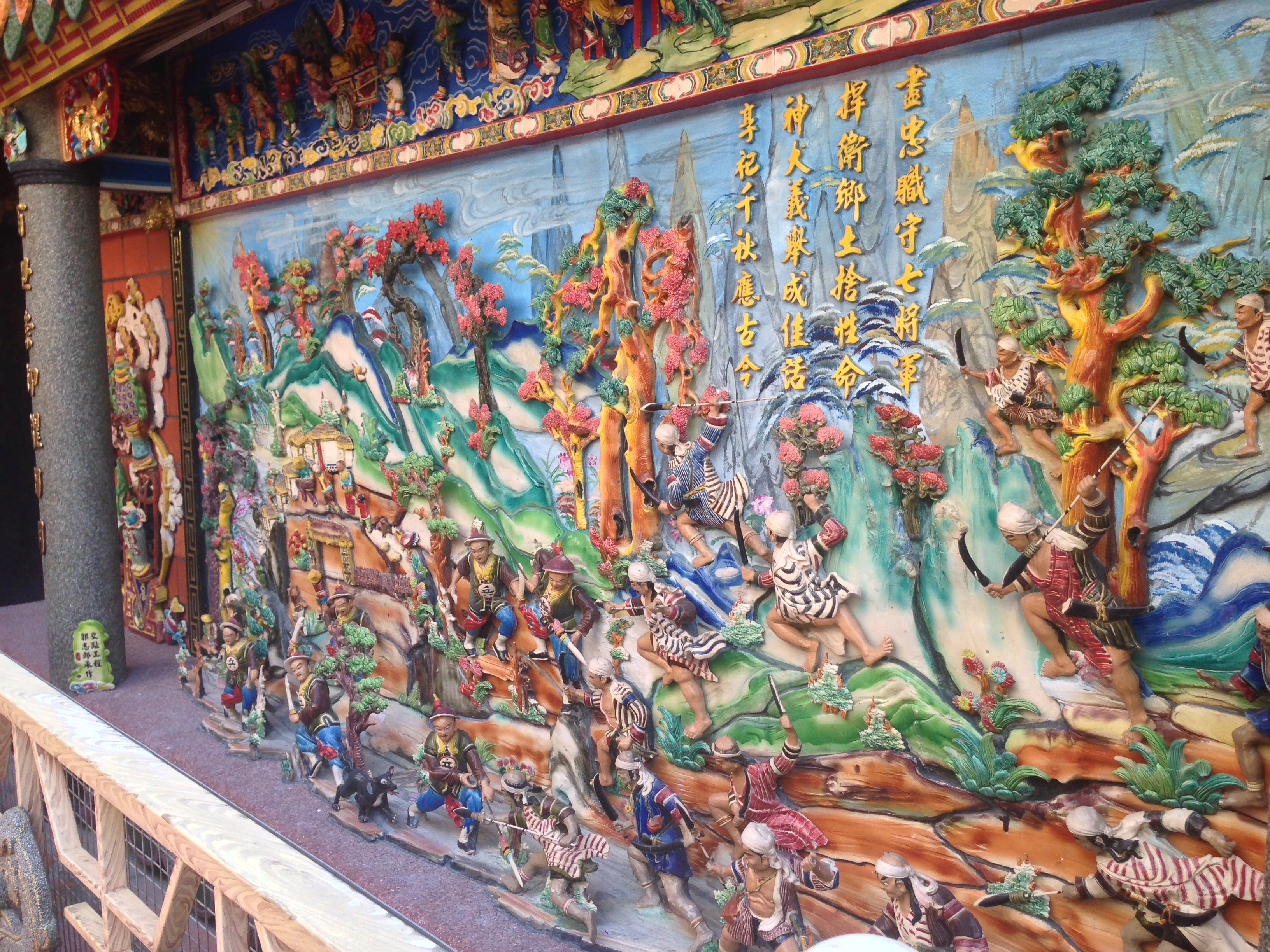 中文（台灣）: 大里七將軍廟裝飾